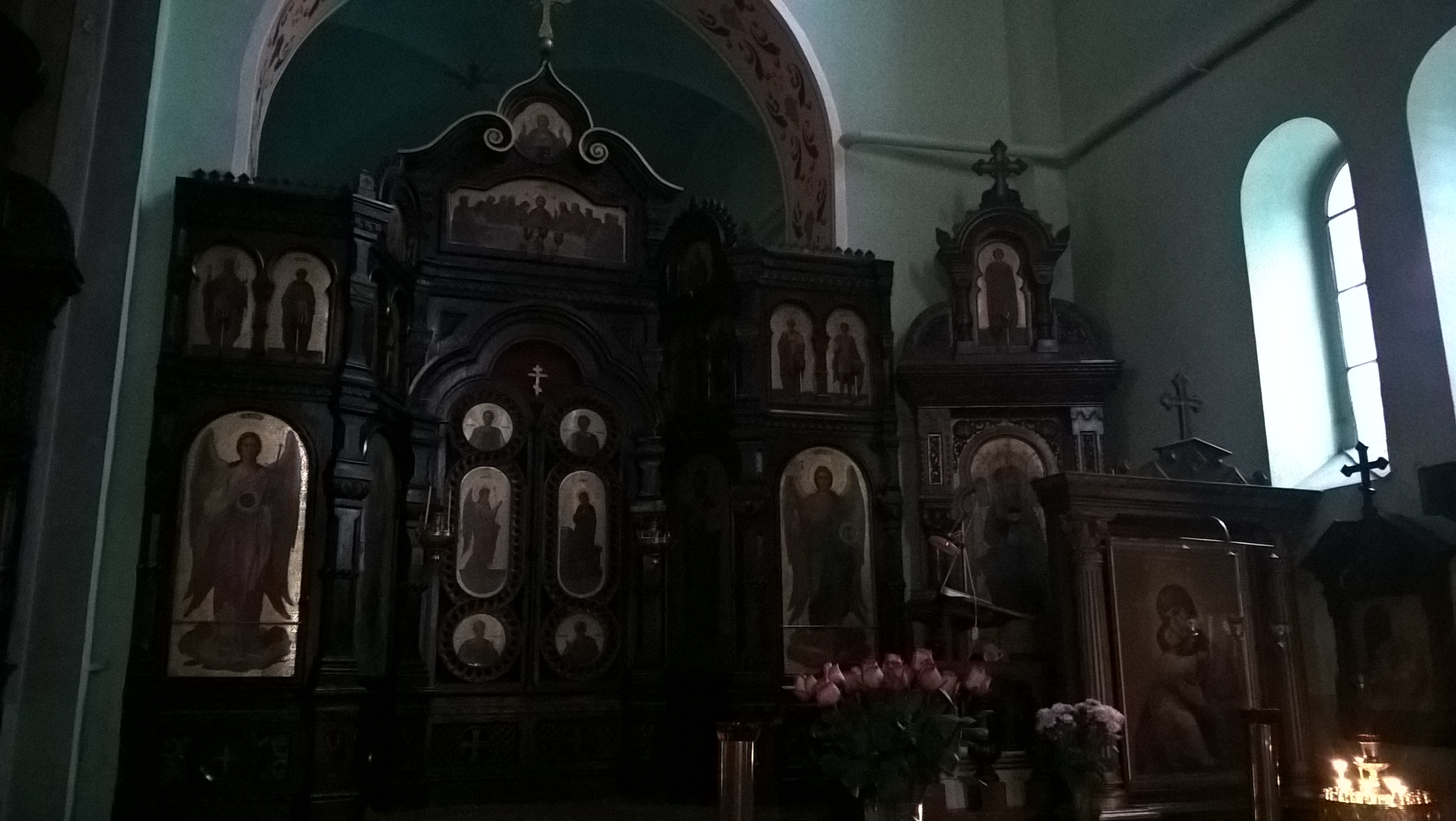 Wnętrze cerkwi cmentarnej św. Jana Chrzciciela w Rydze.Boczny ikonostas